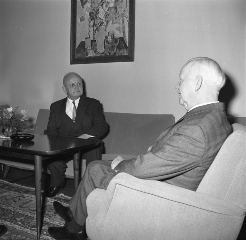 Antrittsbesuch des Landtagspräs. von Baden-Württemberg Camill Wurz bei Bundespräs. Lübke